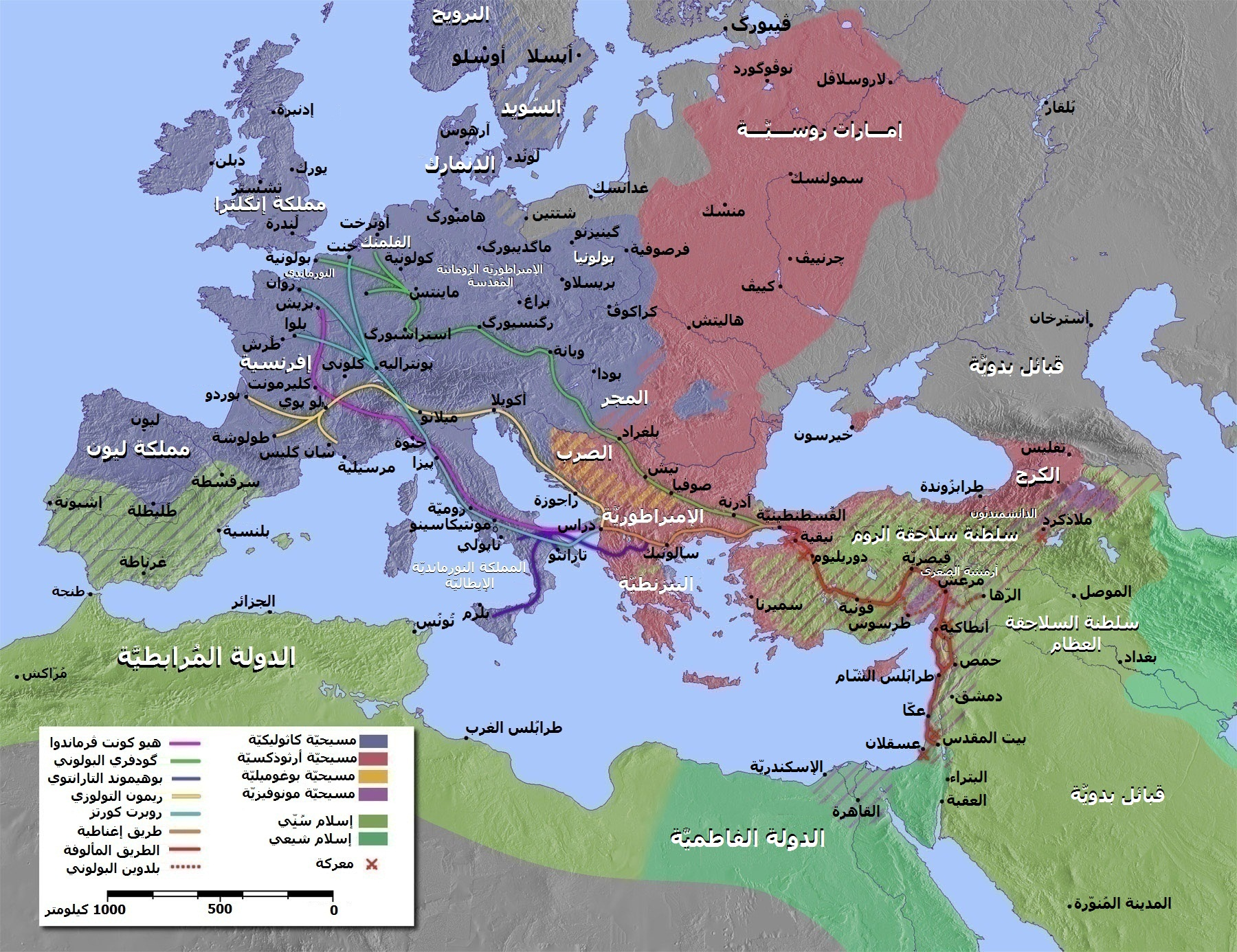 خريطة تُبيِّن مسار الجُيوش الأوروپيَّة إلى المشرق الإسلامي خِلال الحملة الصليبيَّة الأولى، وفيها مُسمَّيات بعض المُدن كما كان يعرفها المُسلمون بِاللُغة العربيَّة، مثل: بريش = باريس.